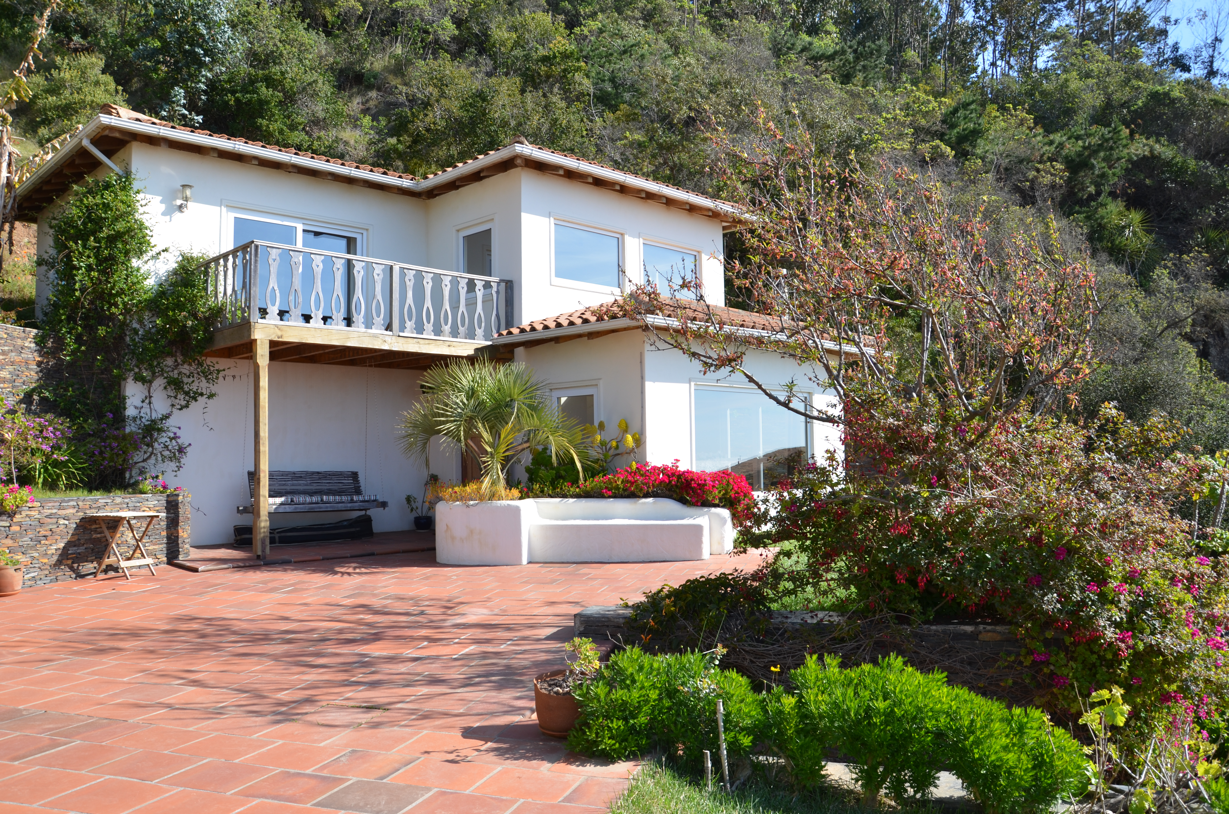 Restaurante La Joya del Mar, ubicado en Buchupureo, Región del Biobío, Chile.